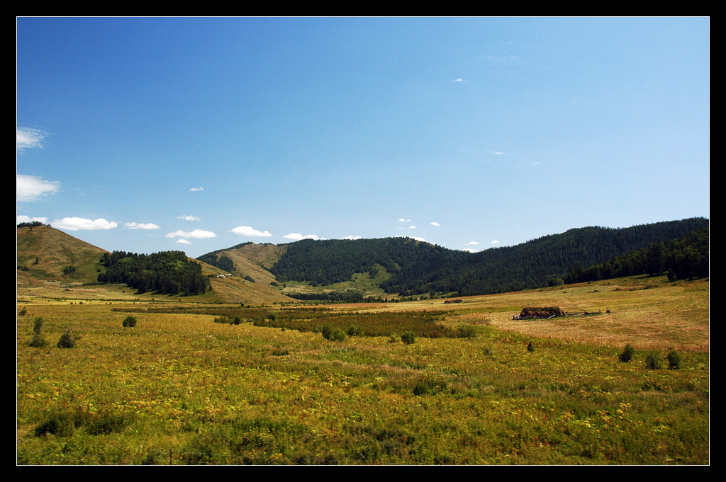 Burqin, Altay, Xinjiang, China